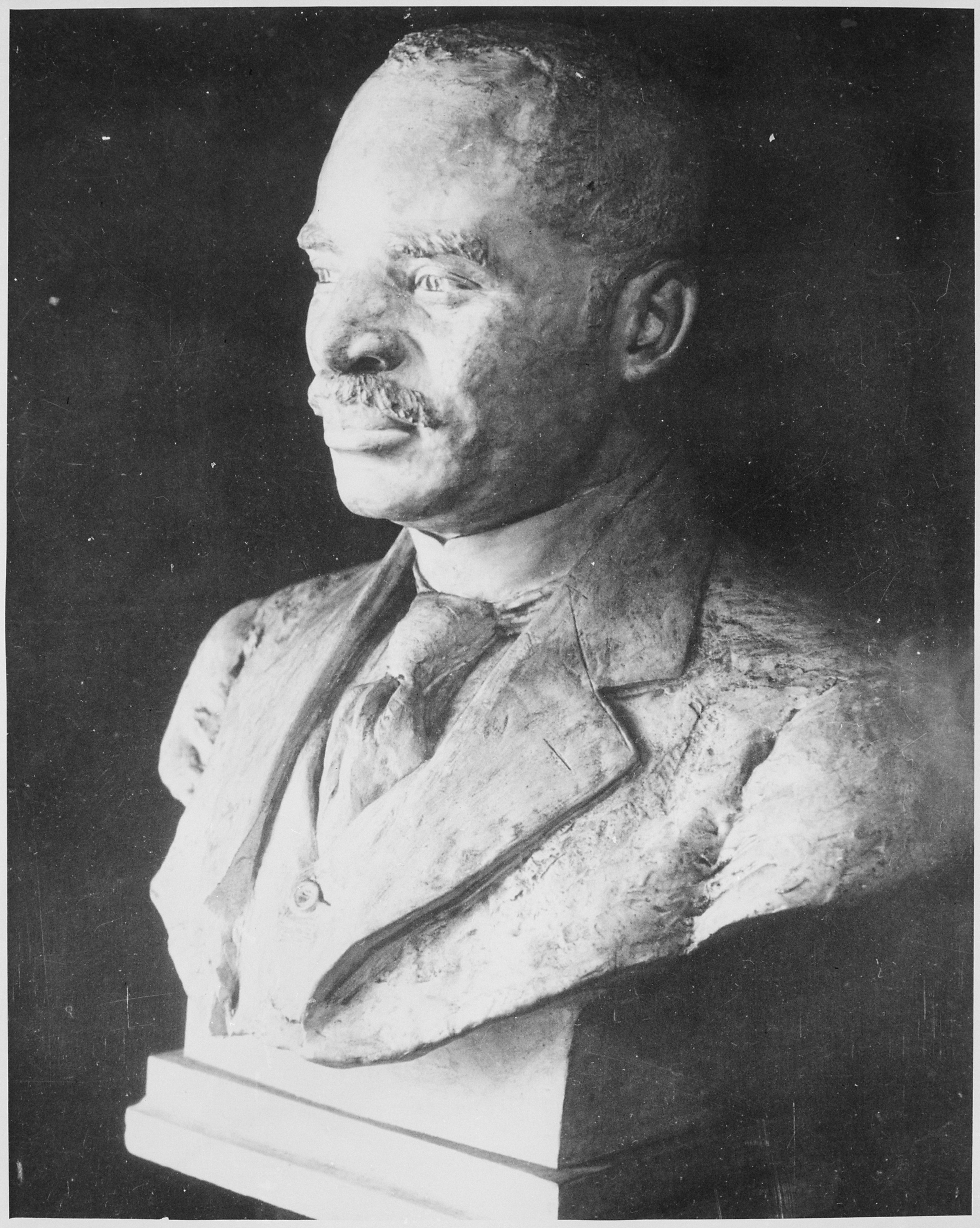 General notes: Sculpture.